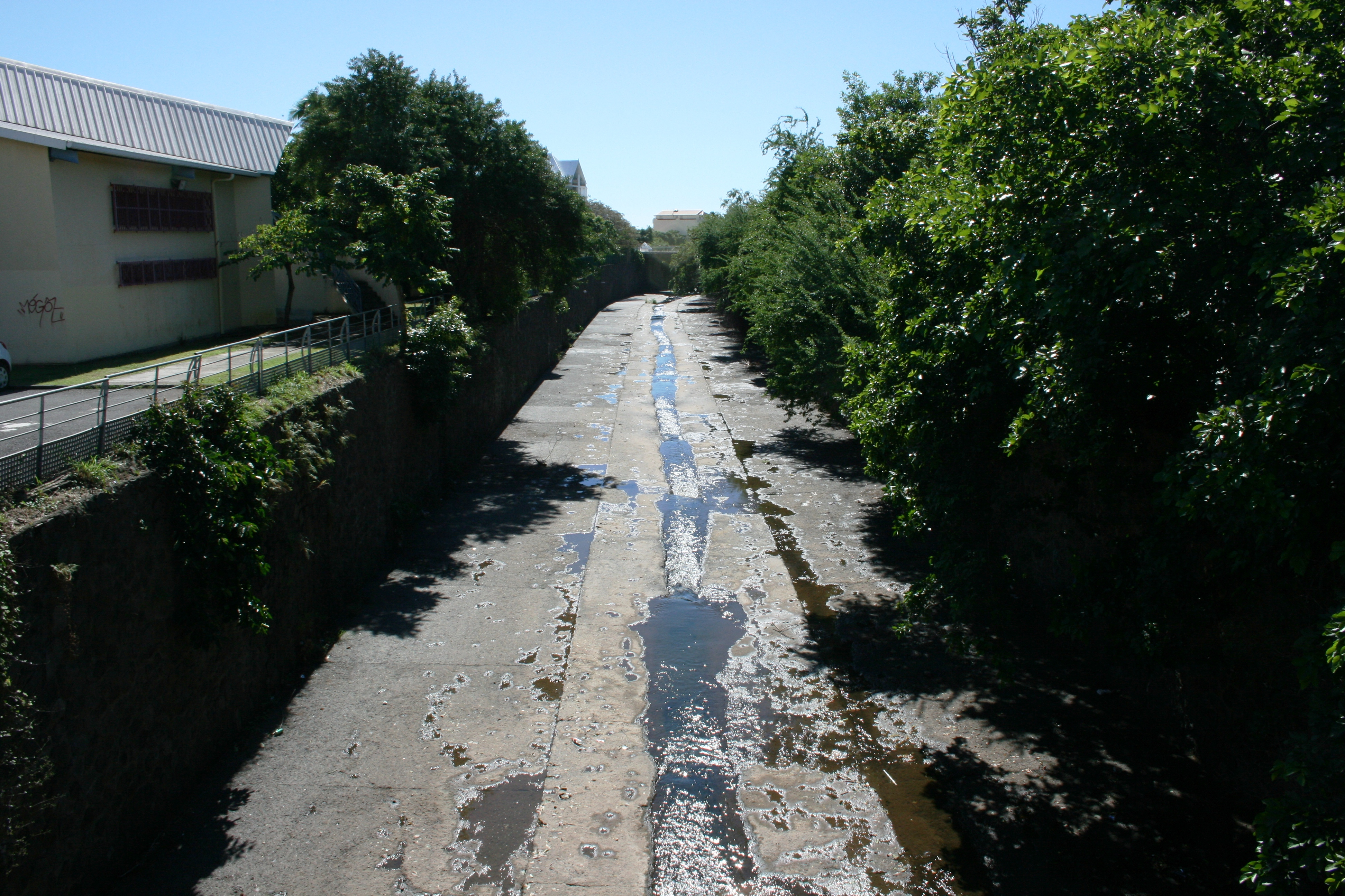 Vue de la Ravine du Butor alors qu'elle traverse Champ Fleuri à Saint-Denis de La Réunion.